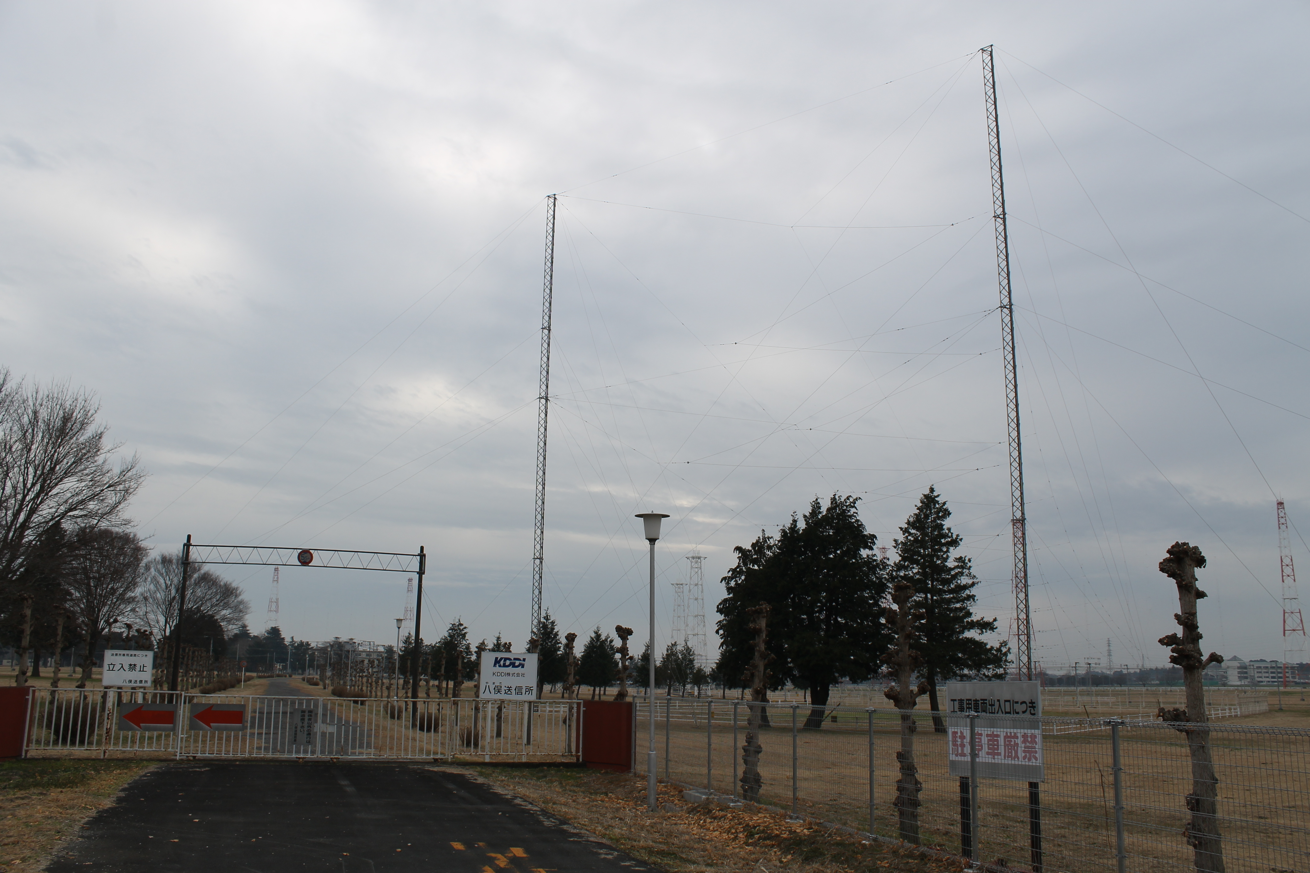 KDDI 八俣送信所（2018年12月撮影） NHKワールドラジオ日本と「しおかぜ」の送信所